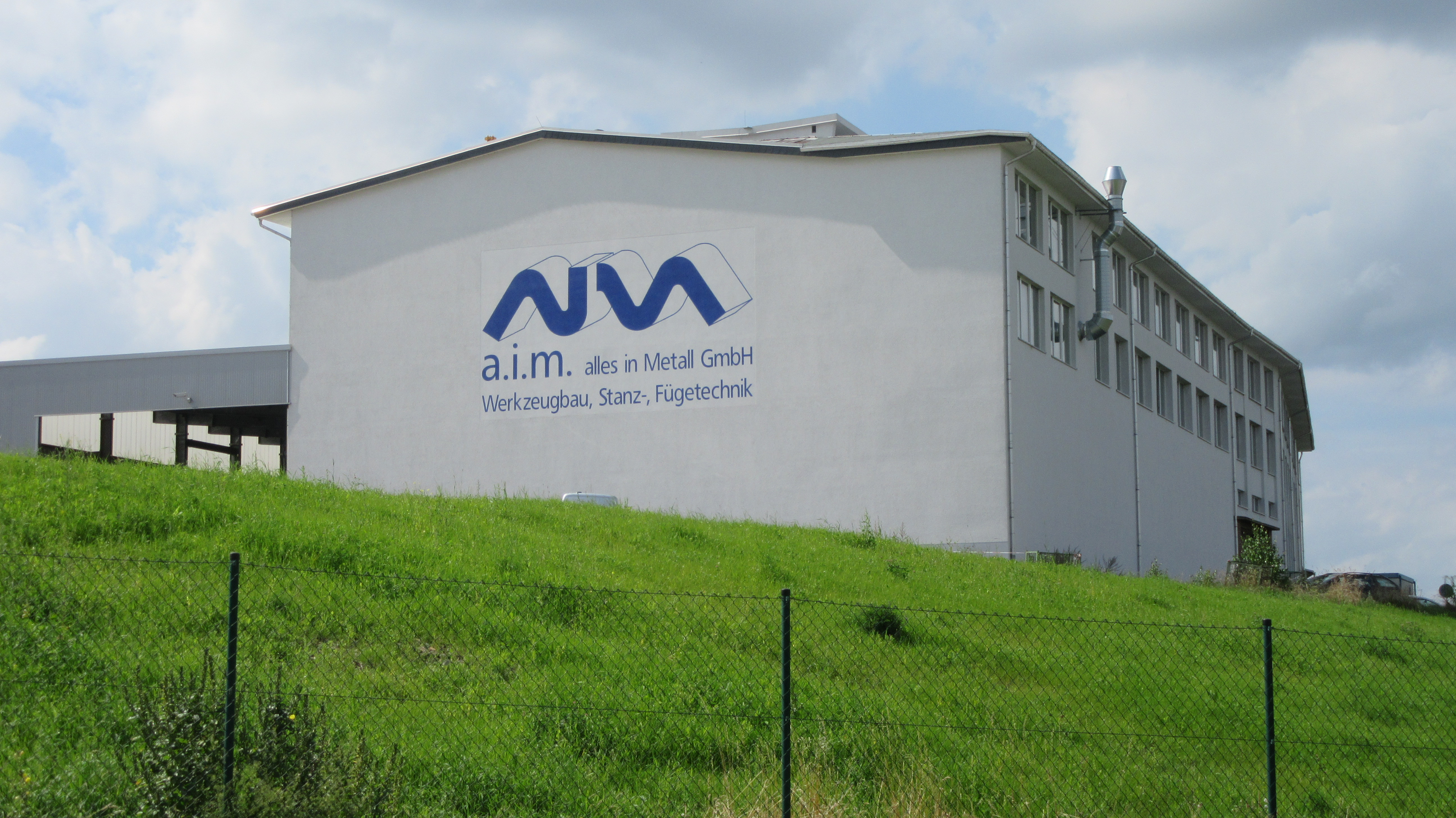 Alles-in-Metall-Werk Lengefeld, Gelände des früheren VEB Leuchtenbau